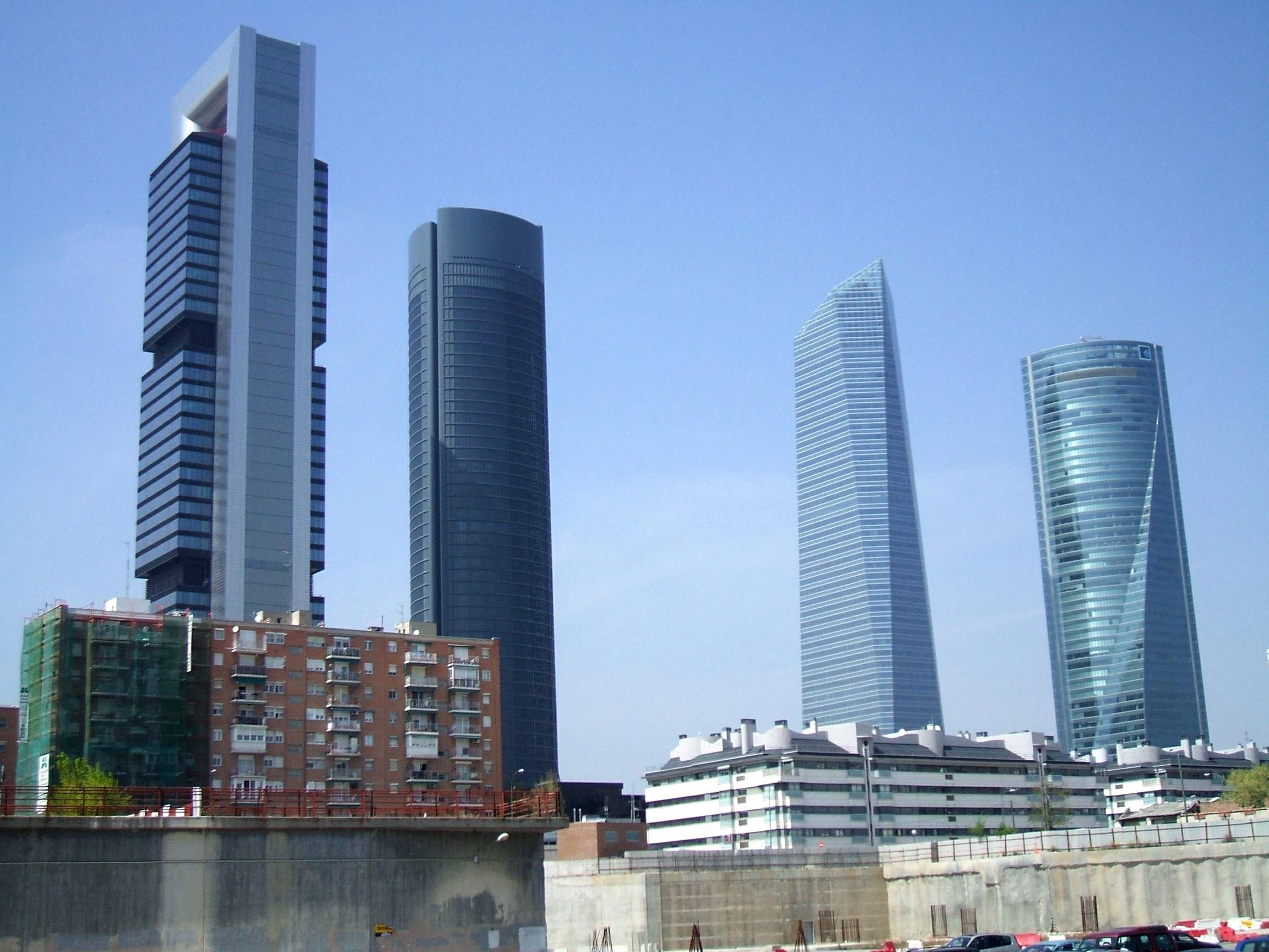 Madrid - Las Cuatro Torres, desde la estación de Chamartín (2011)